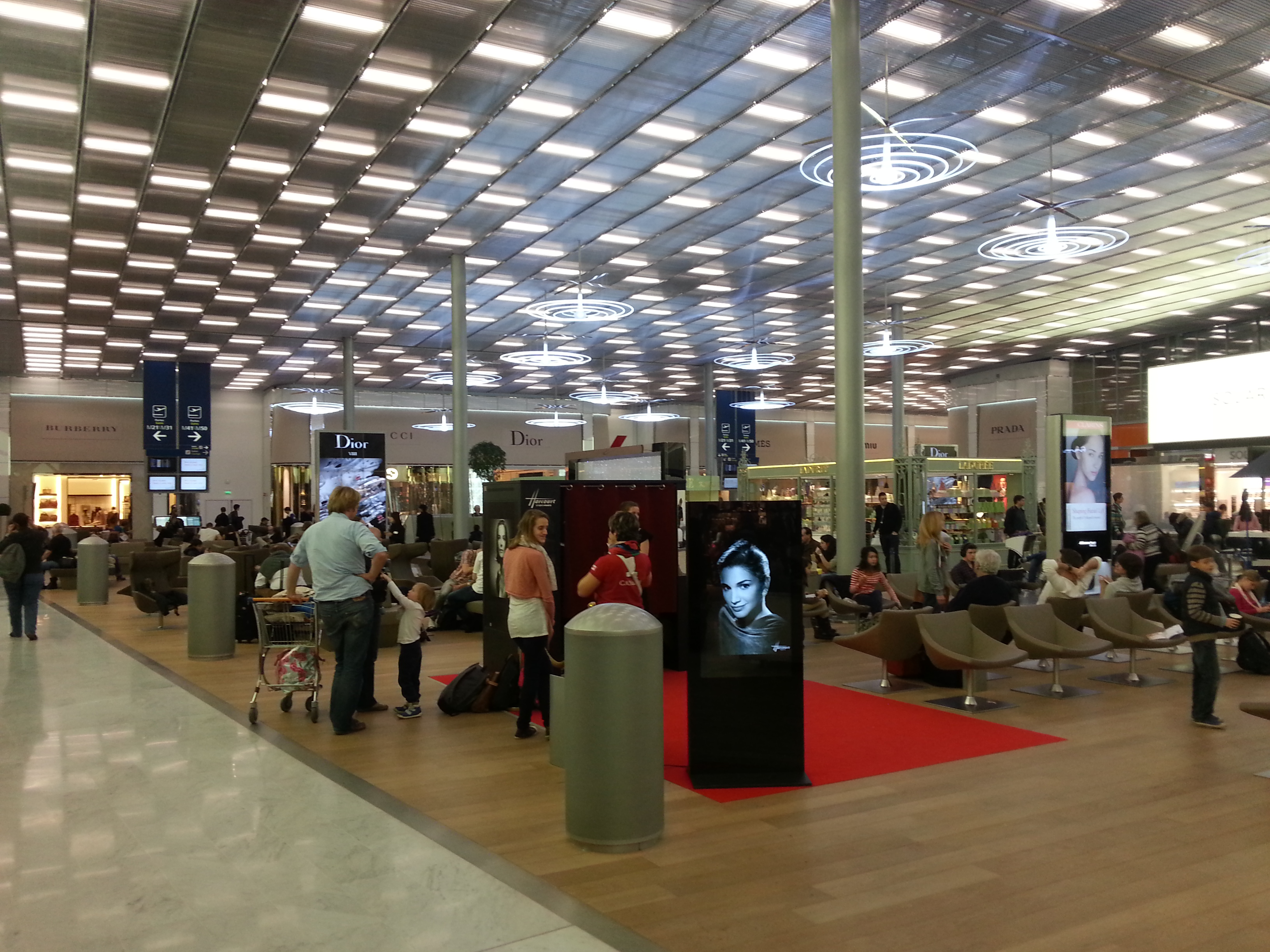 Hall pricipal du satellite 4 à CDG